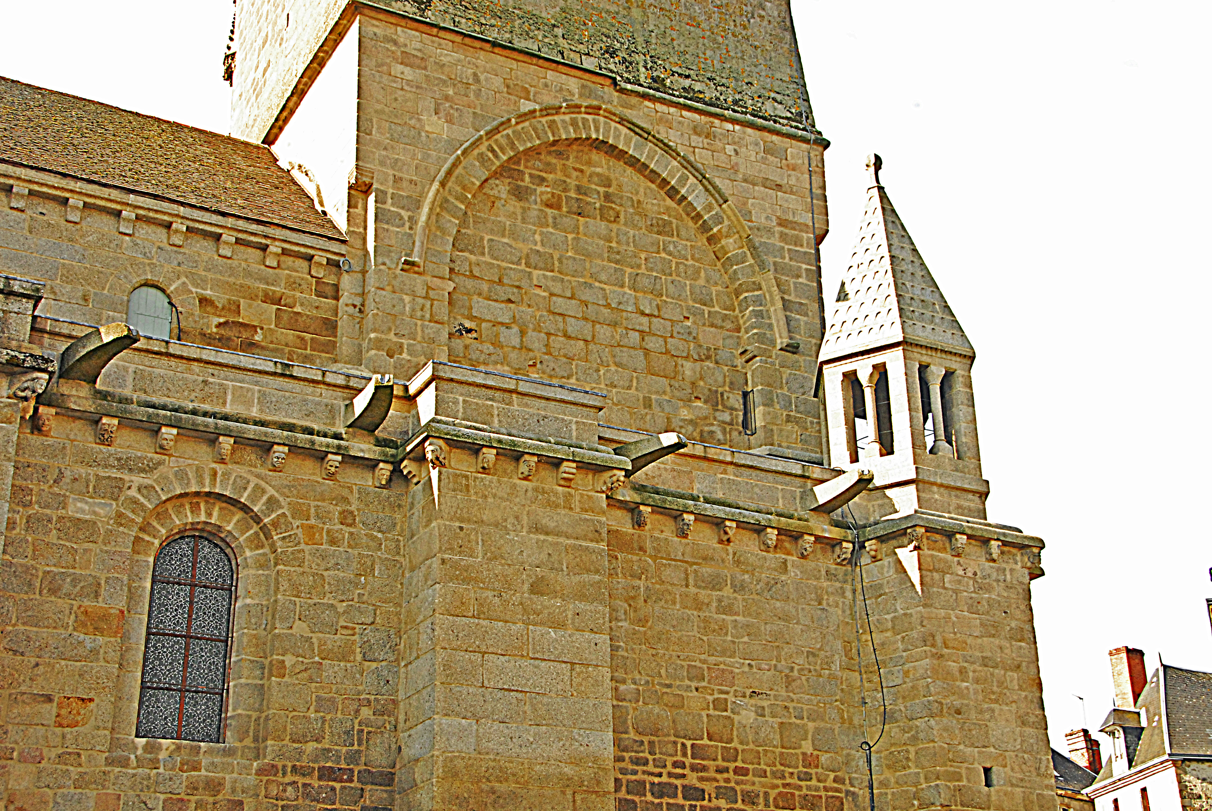 N.-D. de La Souterraine, Turmsockel von N